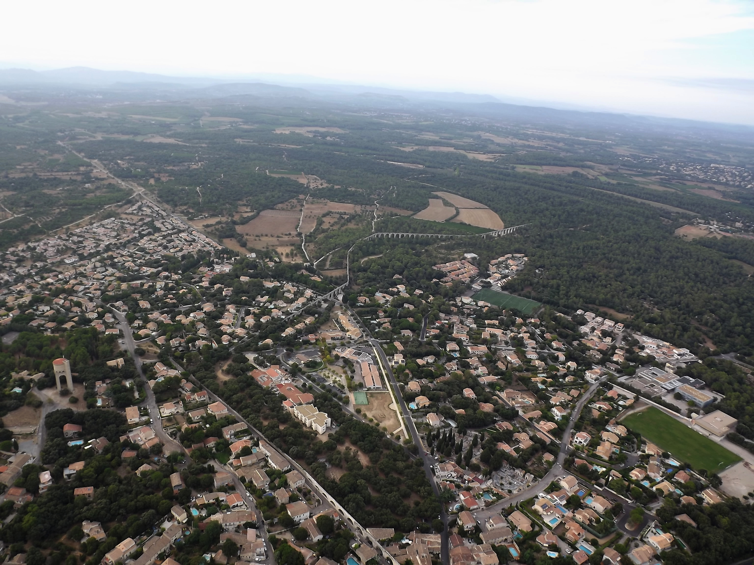 Village de Castrie